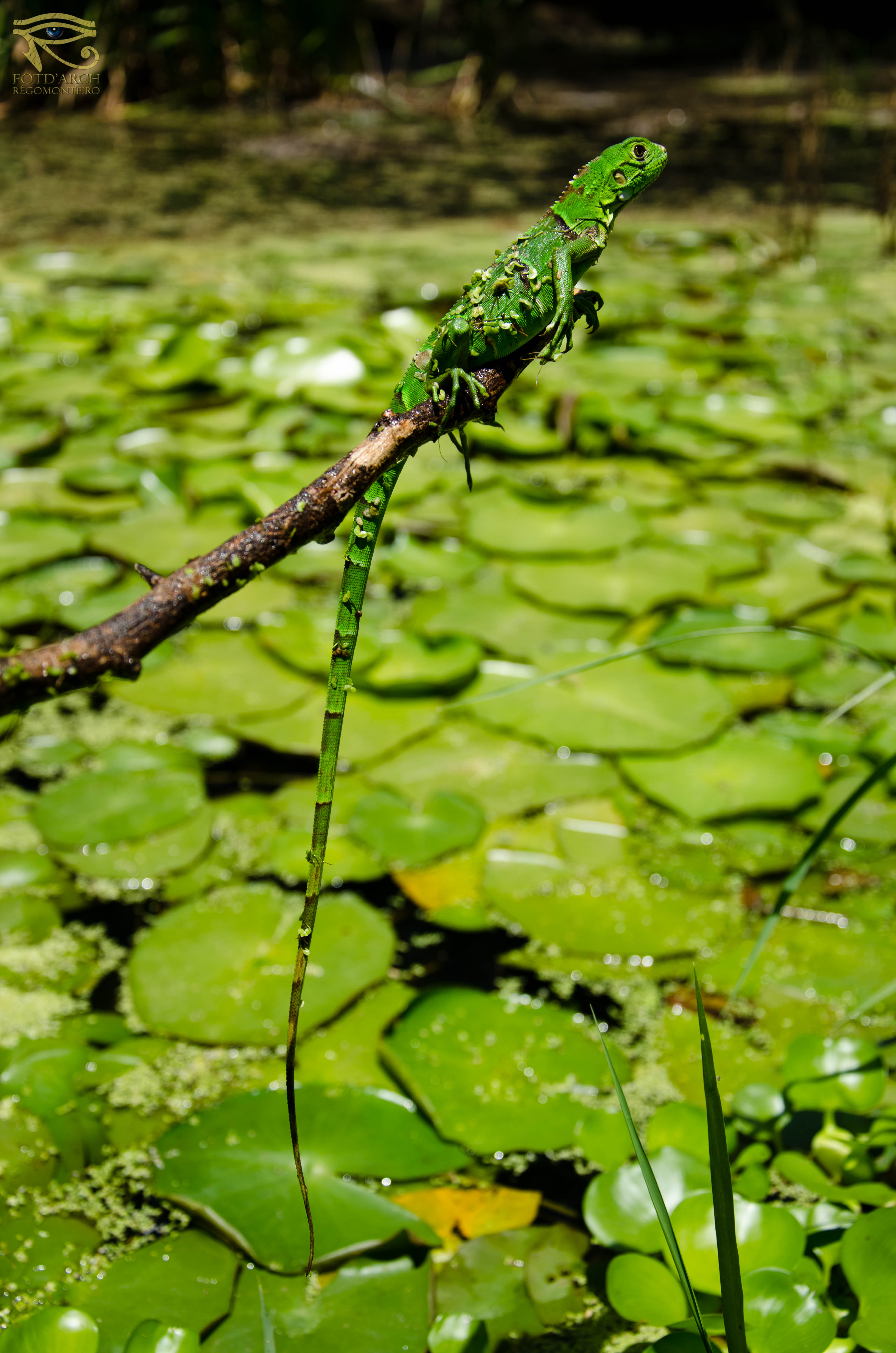 Um filhote de iguana, surpreendentemente ainda resiste no que restou do Rio Piauí, que mesmo poluído, assoreado e desmatado, ainda se torna um oásis verde em meio a seca. São Raimundo Nonato - PI.